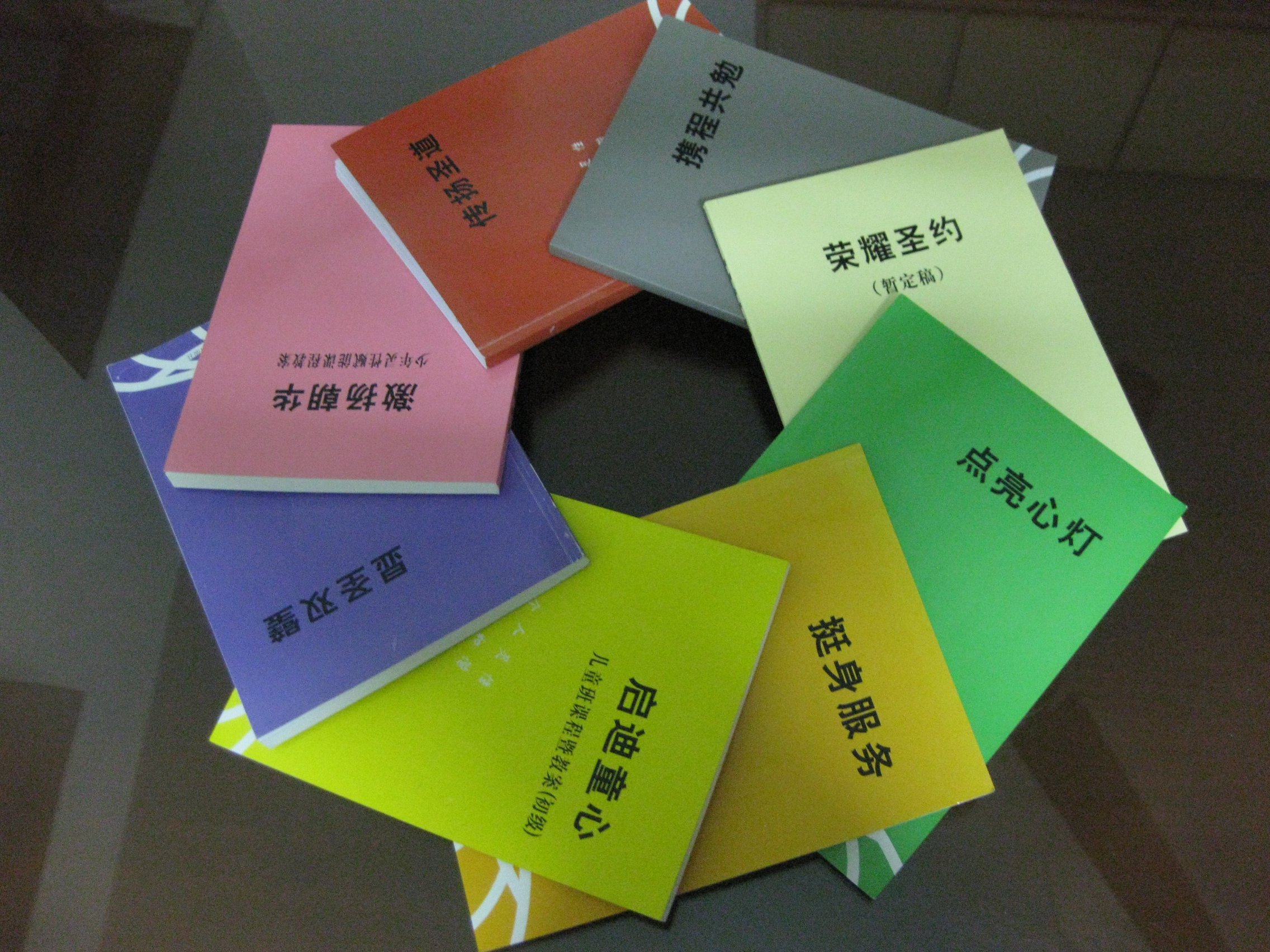 中文巴哈伊学习小组，儒禧课程1-8册书